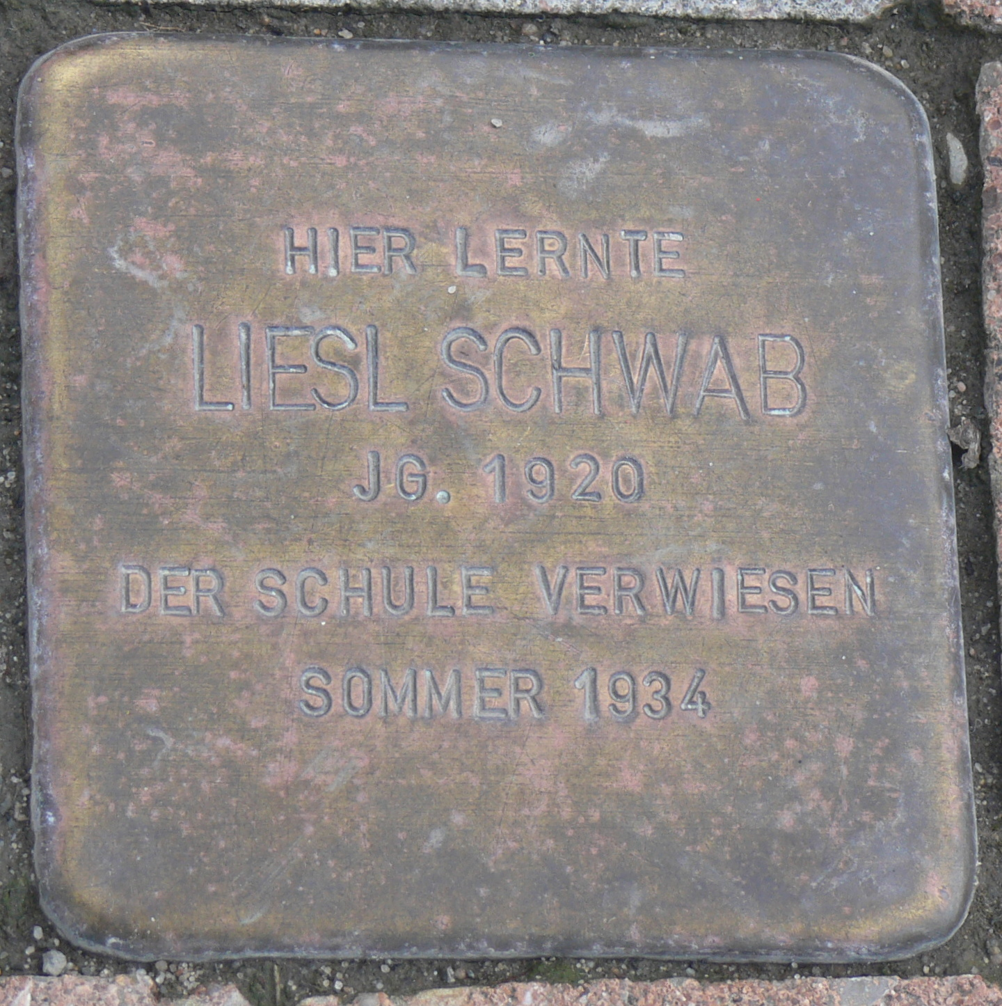 Stolperstein für Liesl Schwab, Schulzentrum, Comeniusstraße 4, Neustadt an der Aisch, Mittelfranken, Bayern, Deutschland